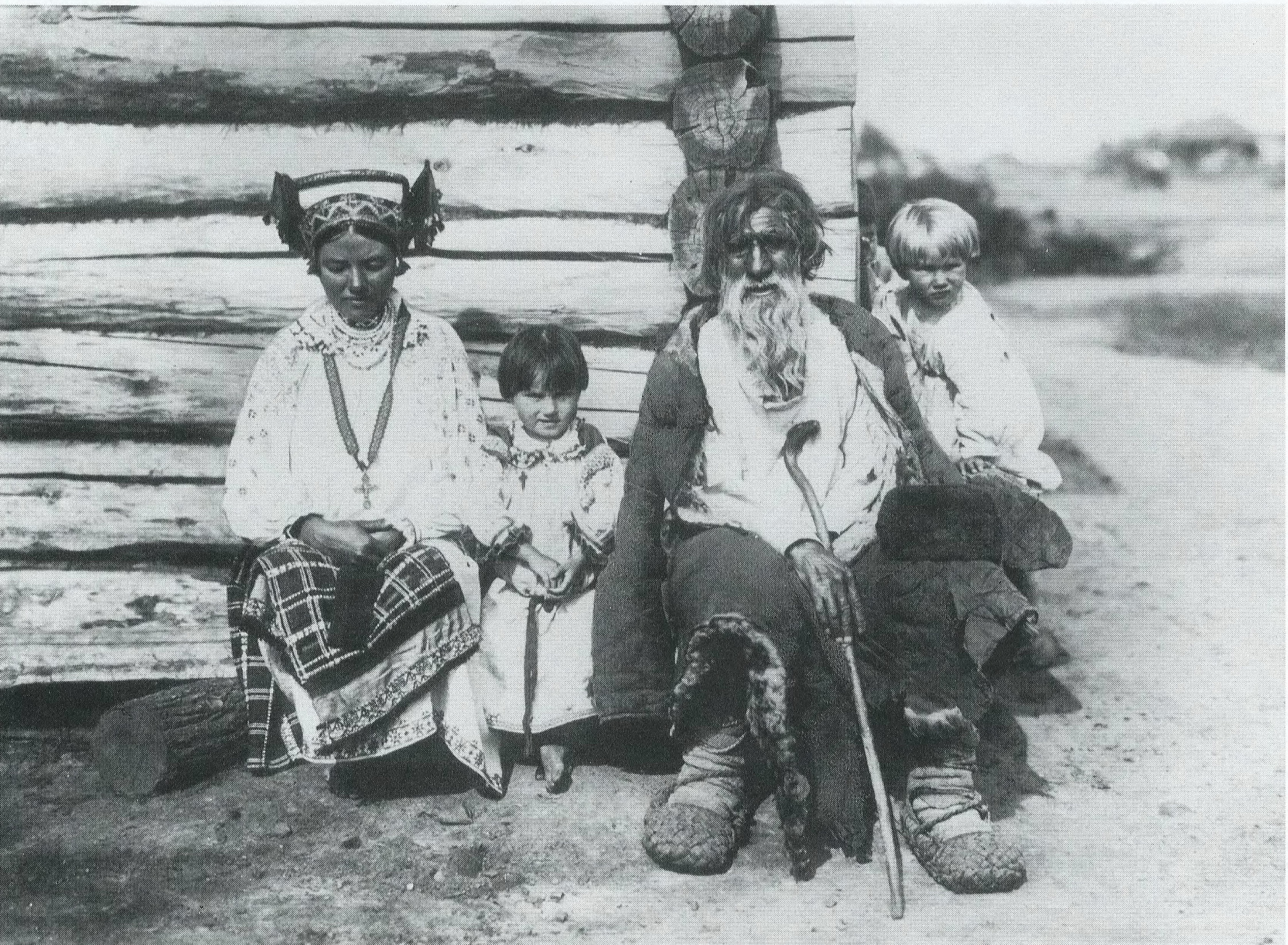 Народный костюм